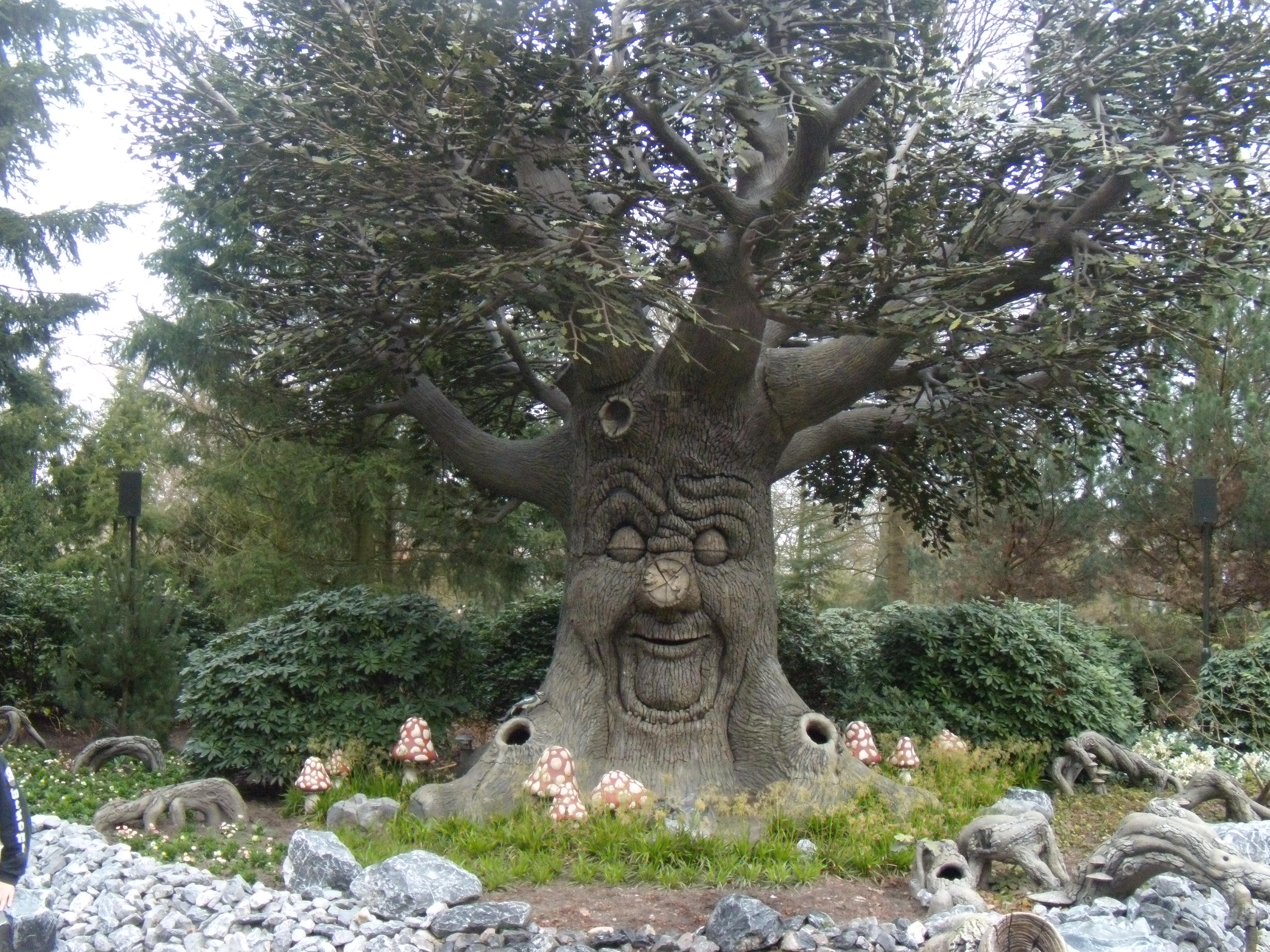 Sprookjesboom - L'arbre des contes dans le parc d'attractions néerlandais Efteling.